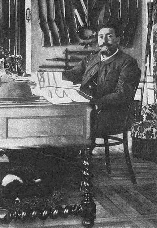 French writer Louis-Henri Boussenard (1847-1910)